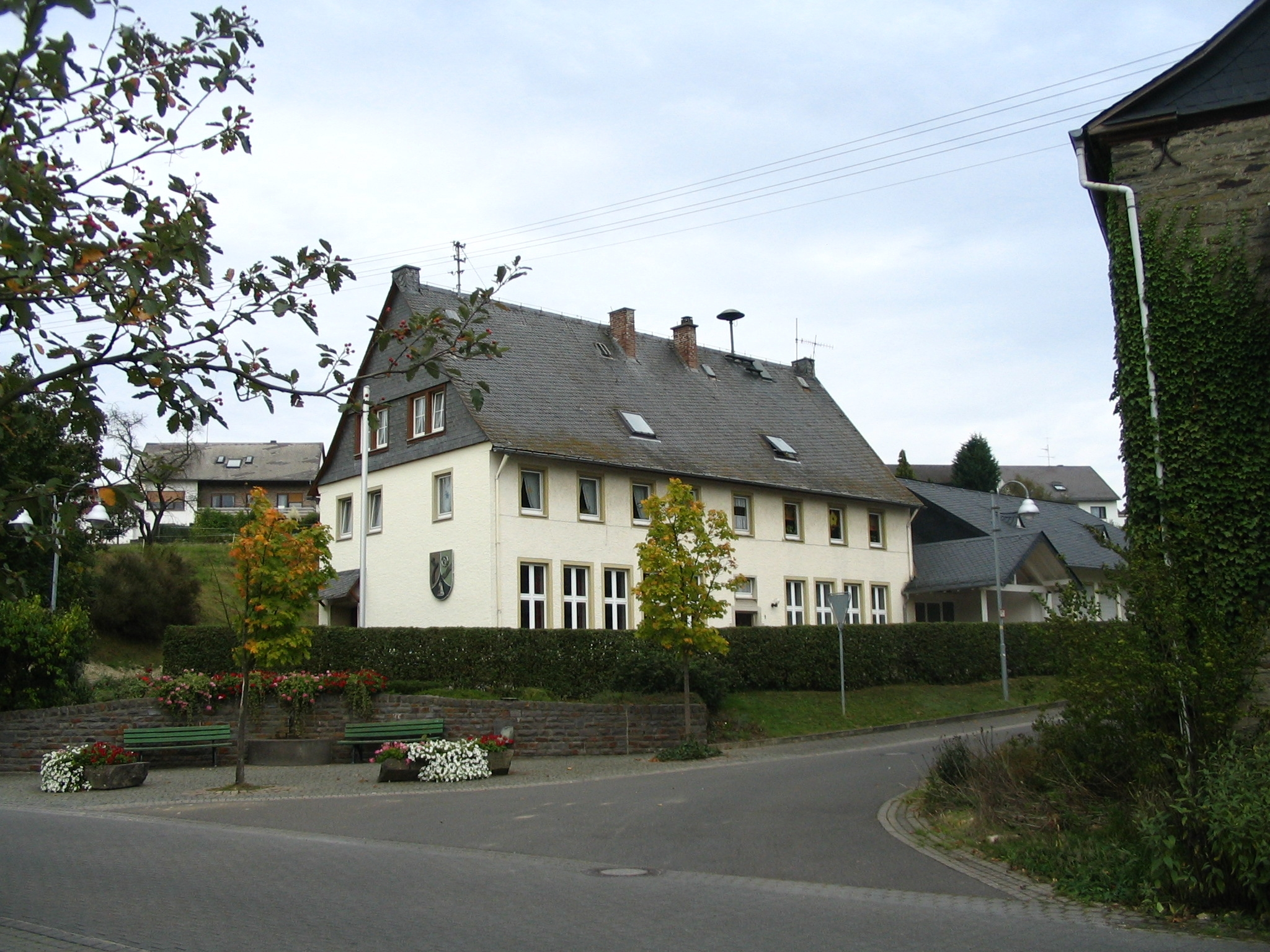 Gemeindehaus Unzenberg im Hunsrück